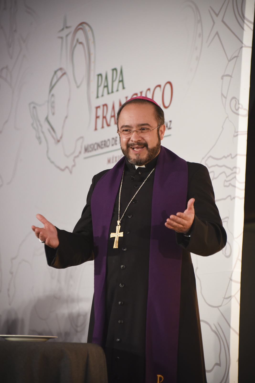 MEXICO CITY, MEXICO: Preparations are under way in anticipation of Pope Francis' Apostolic Visit to Mexico as lent begins. Pictured : Mons. Eugenio Lira Rugarcía, Secretario General de la Conferencia del Episcopado Mexicano (CEM) y Coordinador General de la Visita Apostólica del Papa Francisco a México - General Secretary of the Mexican Episcopal Conference (CEM) and General Coordinator of the Apostolic Visit of Pope Francisco to Mexico Blessing the Press/Media Center @MonsLira @ConElPapa @AleteiaEN PHOTO CREDIT: Marko Vombergar/ALETEIA